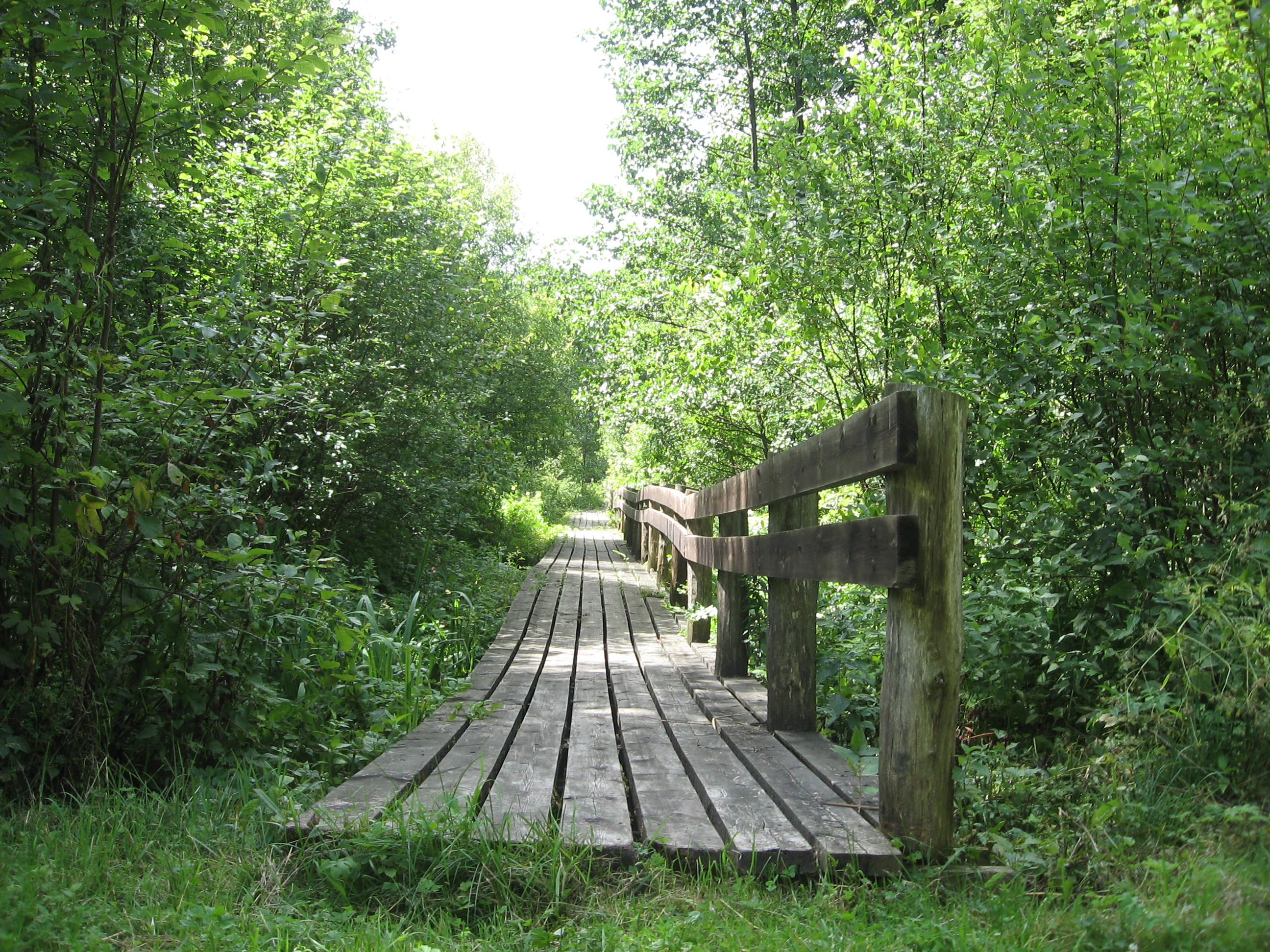 Tiltas Žalgirio miške